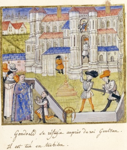 Gondoald se réfugie auprès du roi Gontran. Il est tué en trahison. XVème siècle. Folio 7.